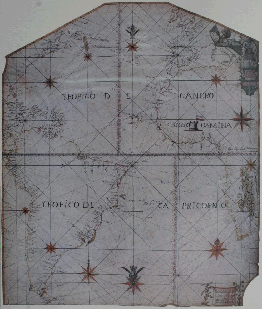 Mapa no setor de obras raras da Biblioteca da Marinha